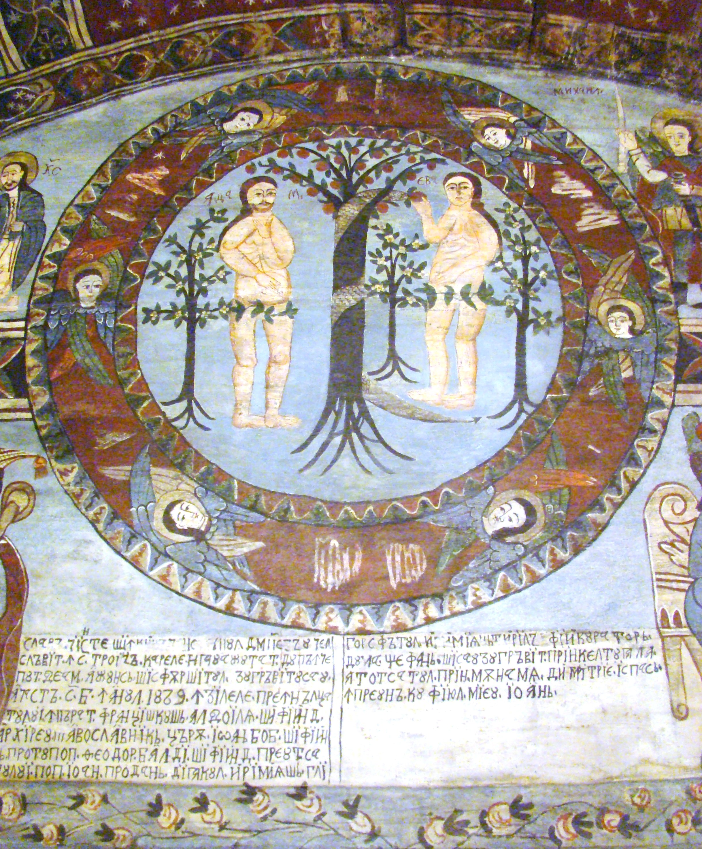 Biserica de lemn „Sf. Arhangheli Mihail şi Gavriil" din Tăuți, județul Cluj